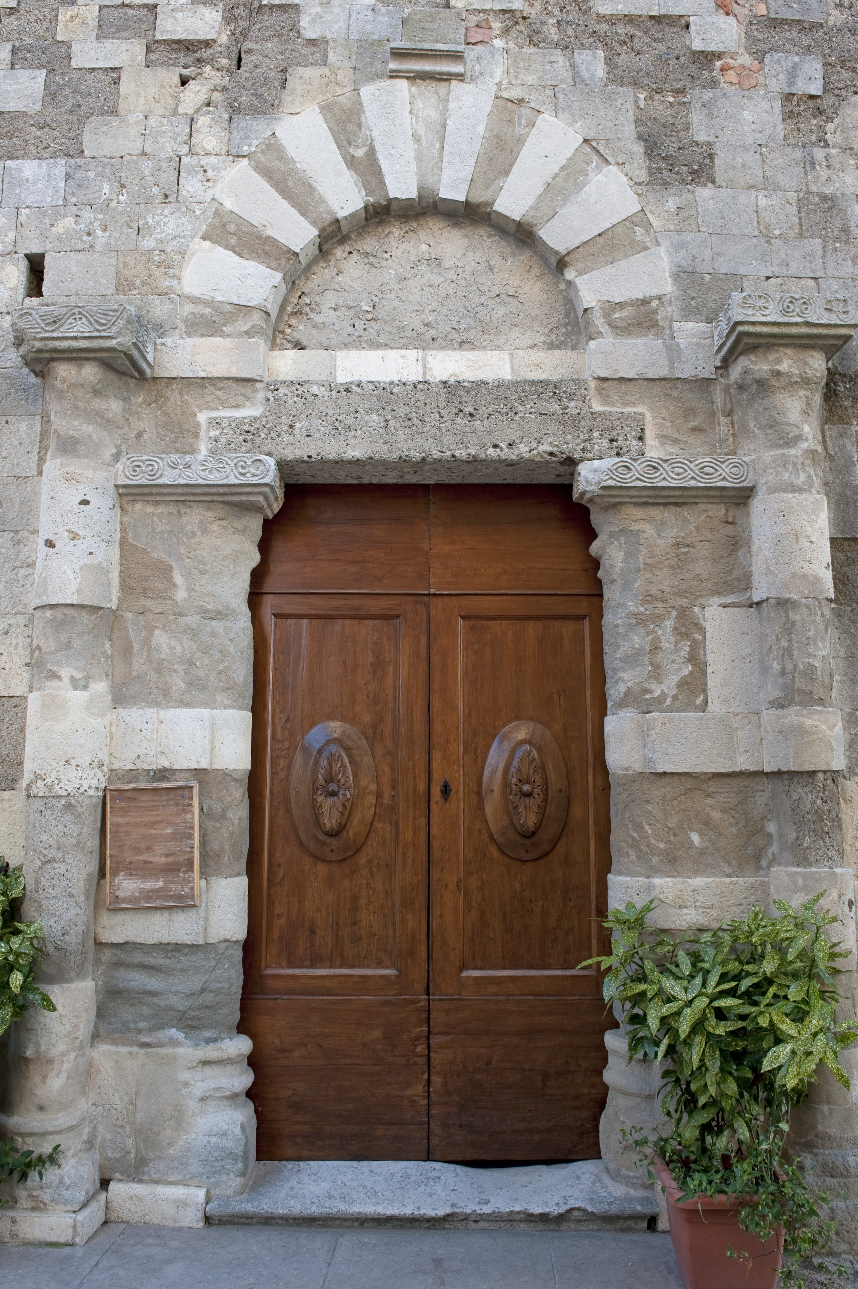 portale della pieve di san Giovanni Battista a Mensano